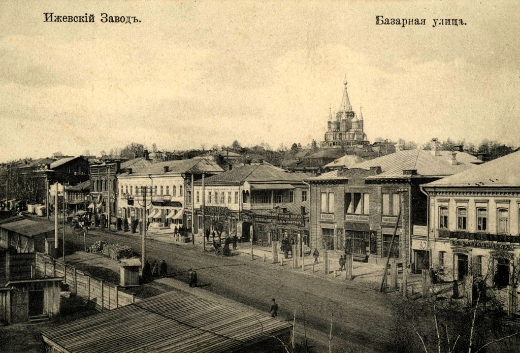 Фото улицы Базарной (современная улица Максима Горького) в Ижевске 1918 года